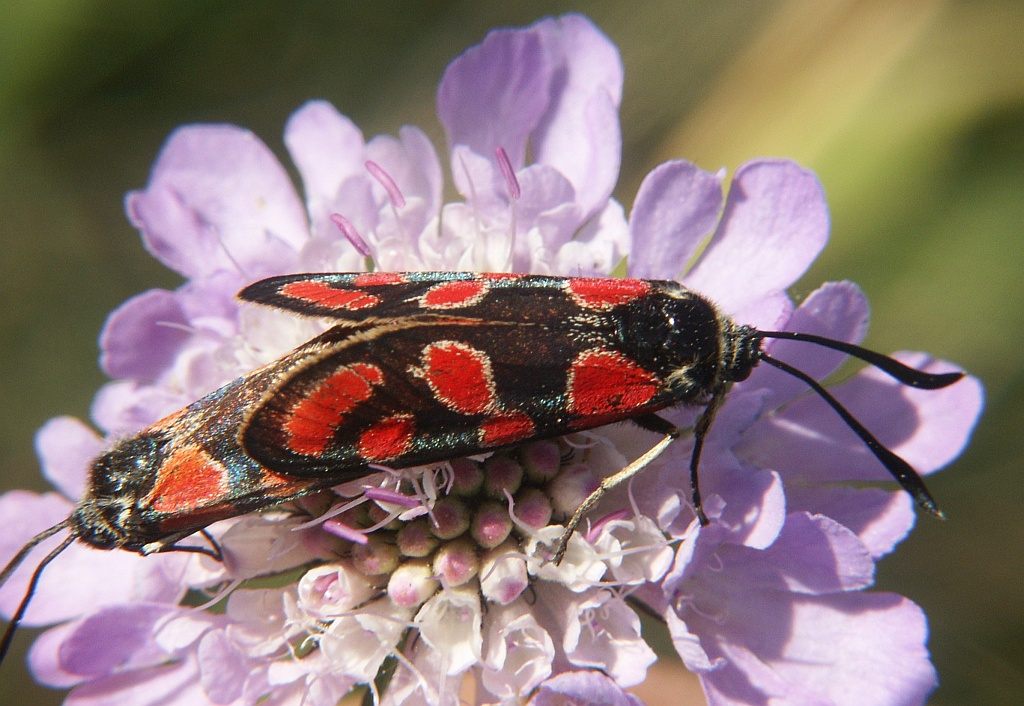 Zygaena carniolica, Nördlinger Ries, Germany